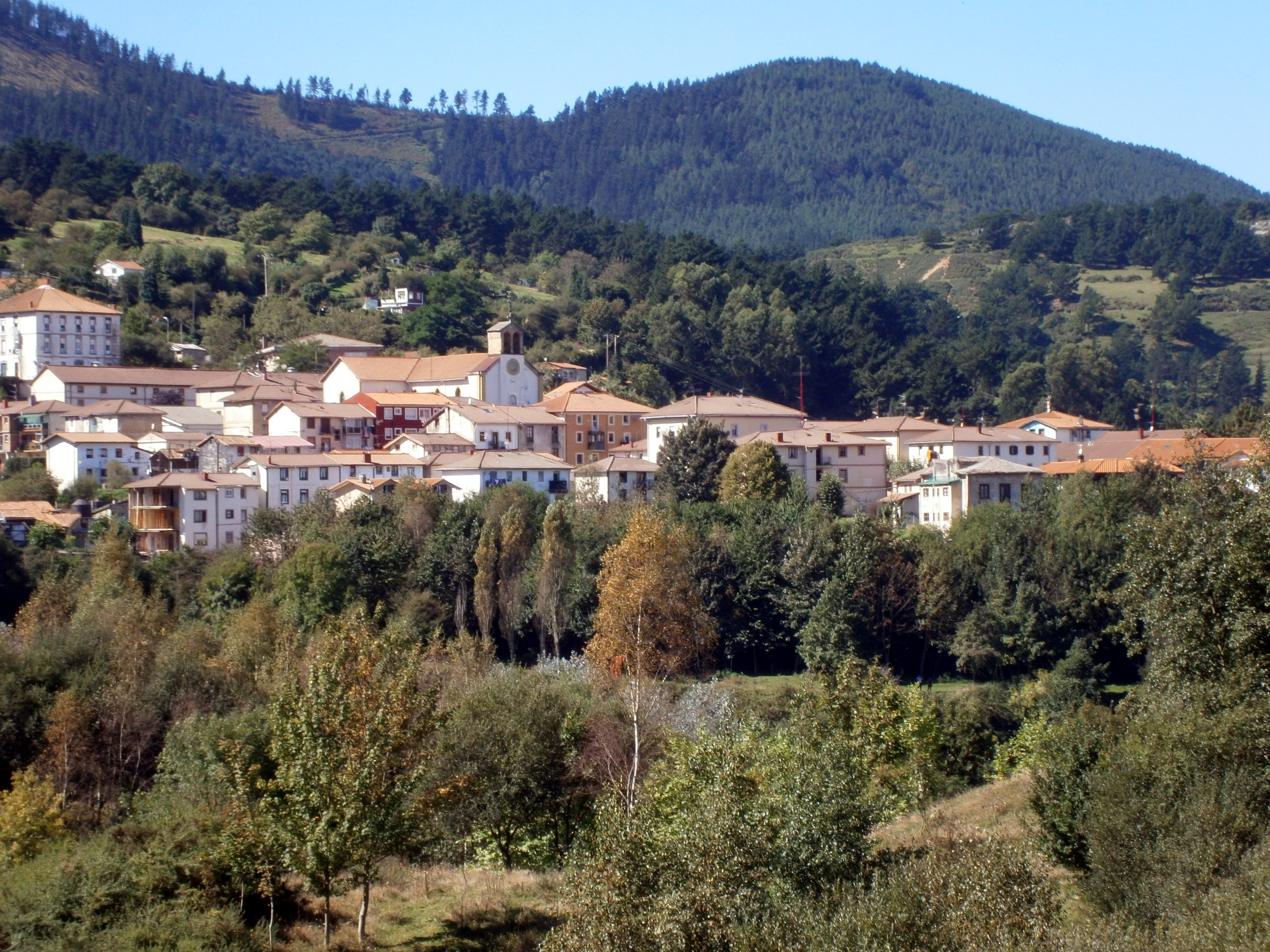 La Arboleda/Zugaztieta, Trapagaran, Bizkaiko Meatzaldea.